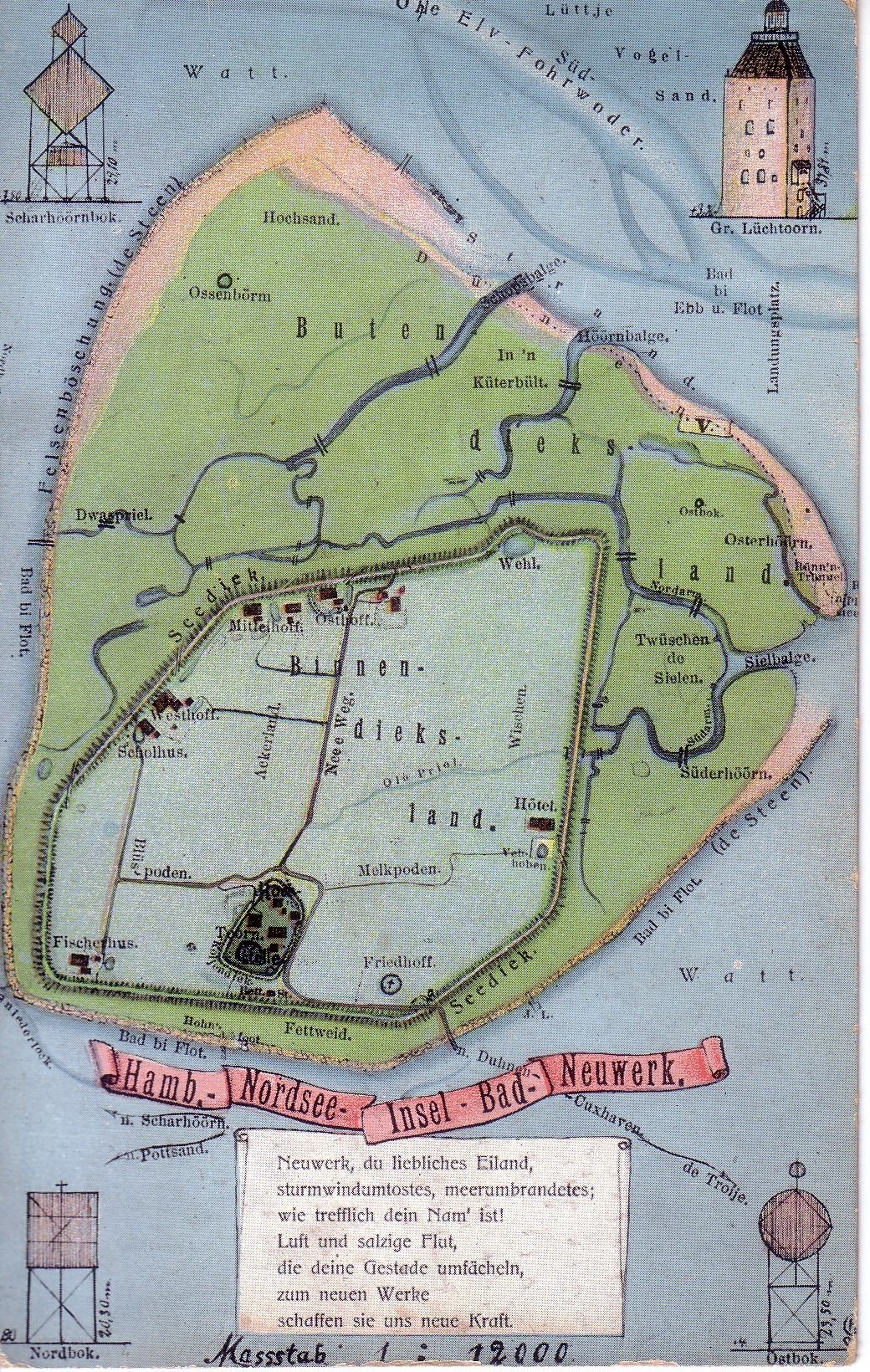 Insel Neuwerk mit Seezeichen (Im Uhrzeigersinn: Großer Leuchtturm, Ostbake, Nordbake, Scharhörnbake) um 1900